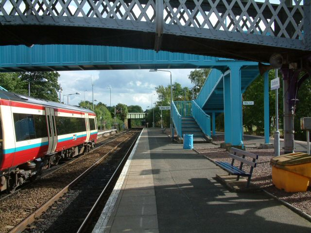 Dunblane Station